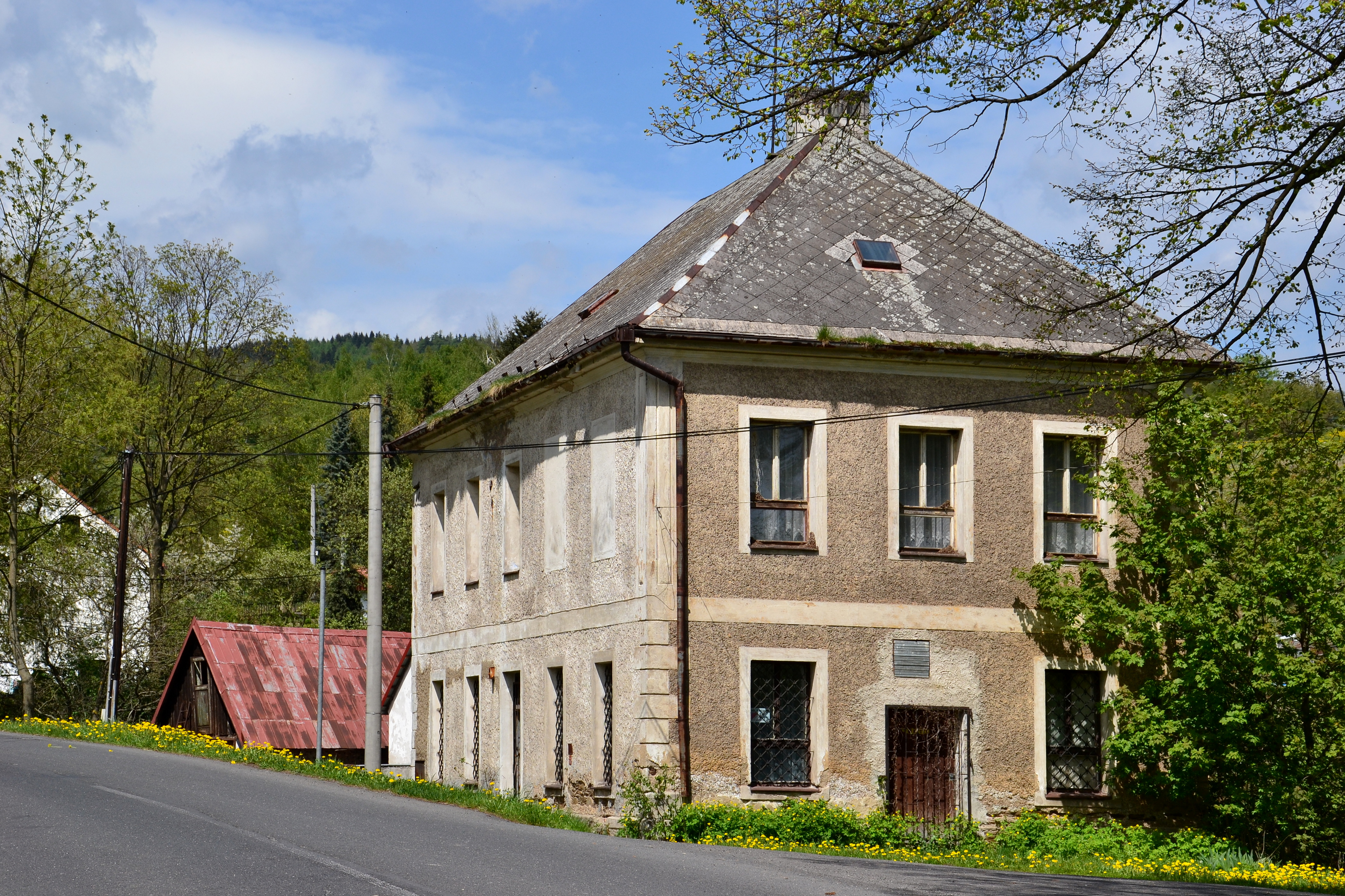 Petlery - budova bývalé školy a později hostince